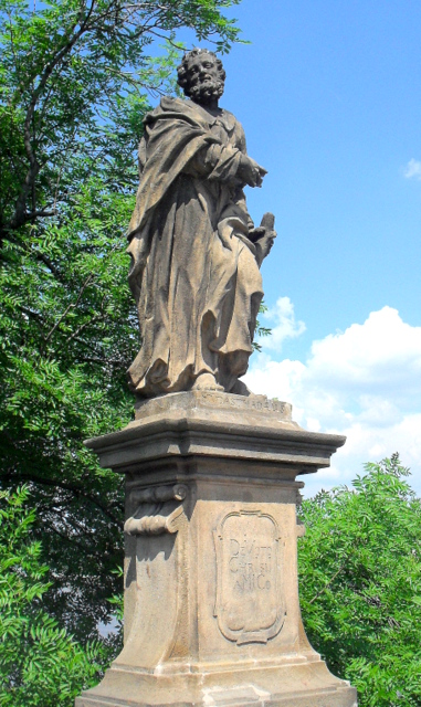 Praga, most Karola, św. Juda Tadeusz